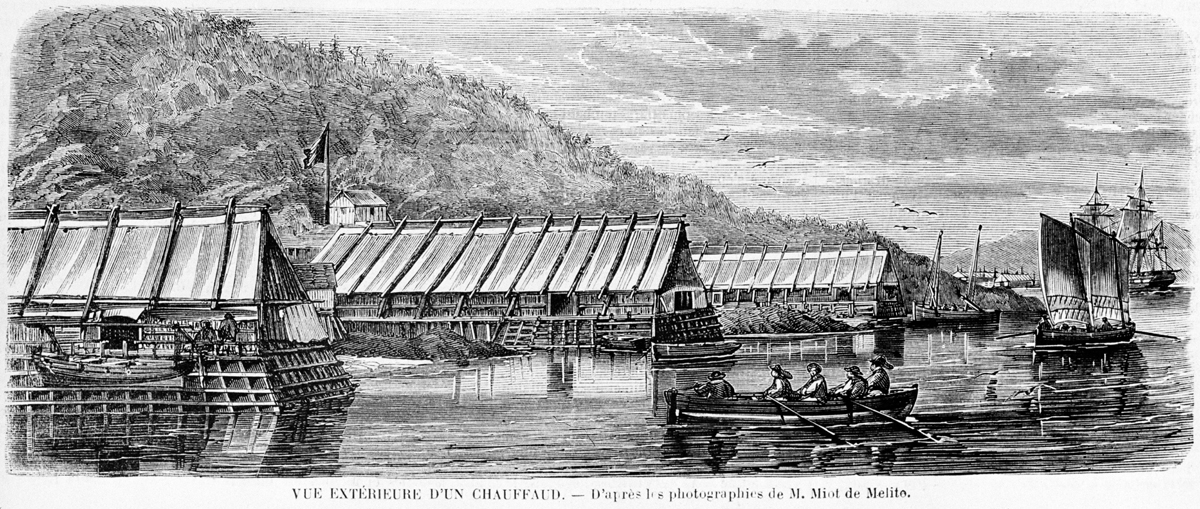 Vue extérieure d'un chauffaud d'après les photographies de M. Miot. Auteur de Melito ?, L'Illustration 2 avril 1859, p. 216. PH 158925.